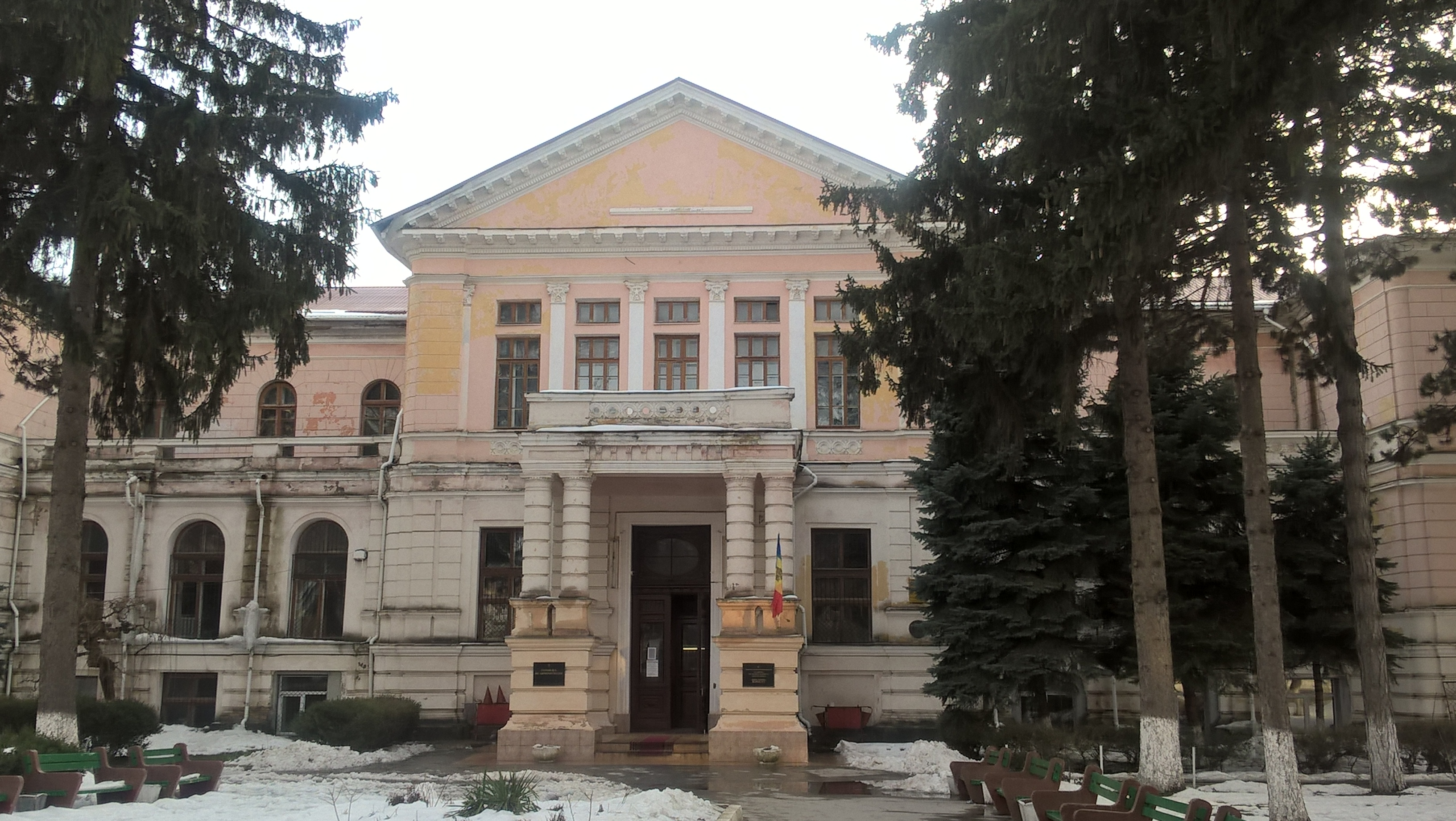 Pałac Rady Kraju (Akademia Sztuk Plastycznych) w Kiszyniowie